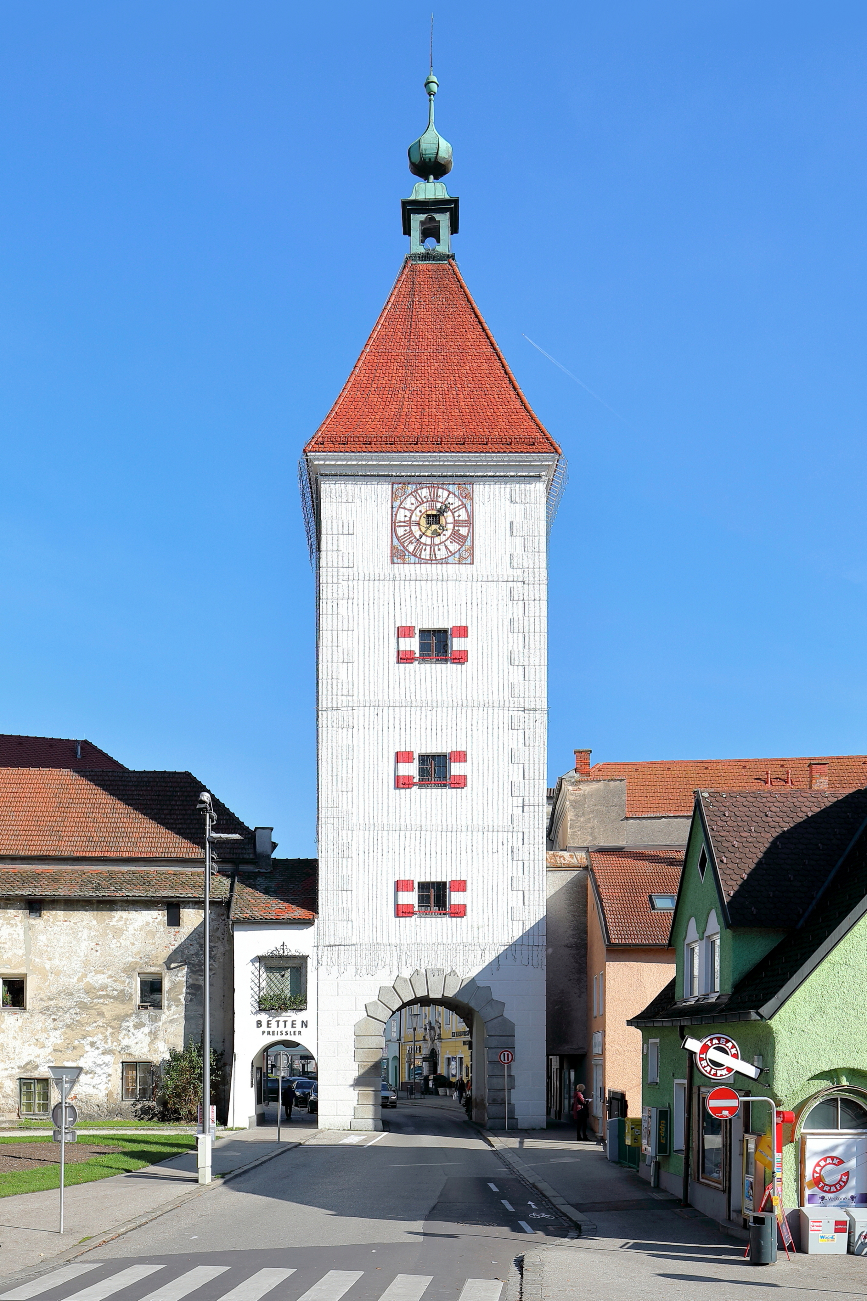 Westansicht des Ledererturmes in der oberösterreichischen Stadt Wels und links der sogenannte Schalenturm.Der Ledererturm ist das Wahrzeichen der Stadt. Er blieb als einziger der vier Stadttürme erhalten, die im 13. Jahrhundert beim Bau der mittelalterlichen Stadtbefestigung errichtet wurden. Der urkundlich erstmals am 24. Juli 1326 erwähnte Turm wurde 1610 beim Angriff des „Passauer Kriegsvolkes“ schwer beschädigt und in der heutigen Form in den Jahren von 1616 bis 1619 durch den Maurermeister Marx Martin Spaz aus Linz wiederinstandgesetzt und umgebaut. Der fast 38 m hohe Turm hatte ursprünglich einen Zwiebelhelm, der jedoch beim Stadtbrand 1771 zerstört und durch ein Zeltdach ersetzt wurde.